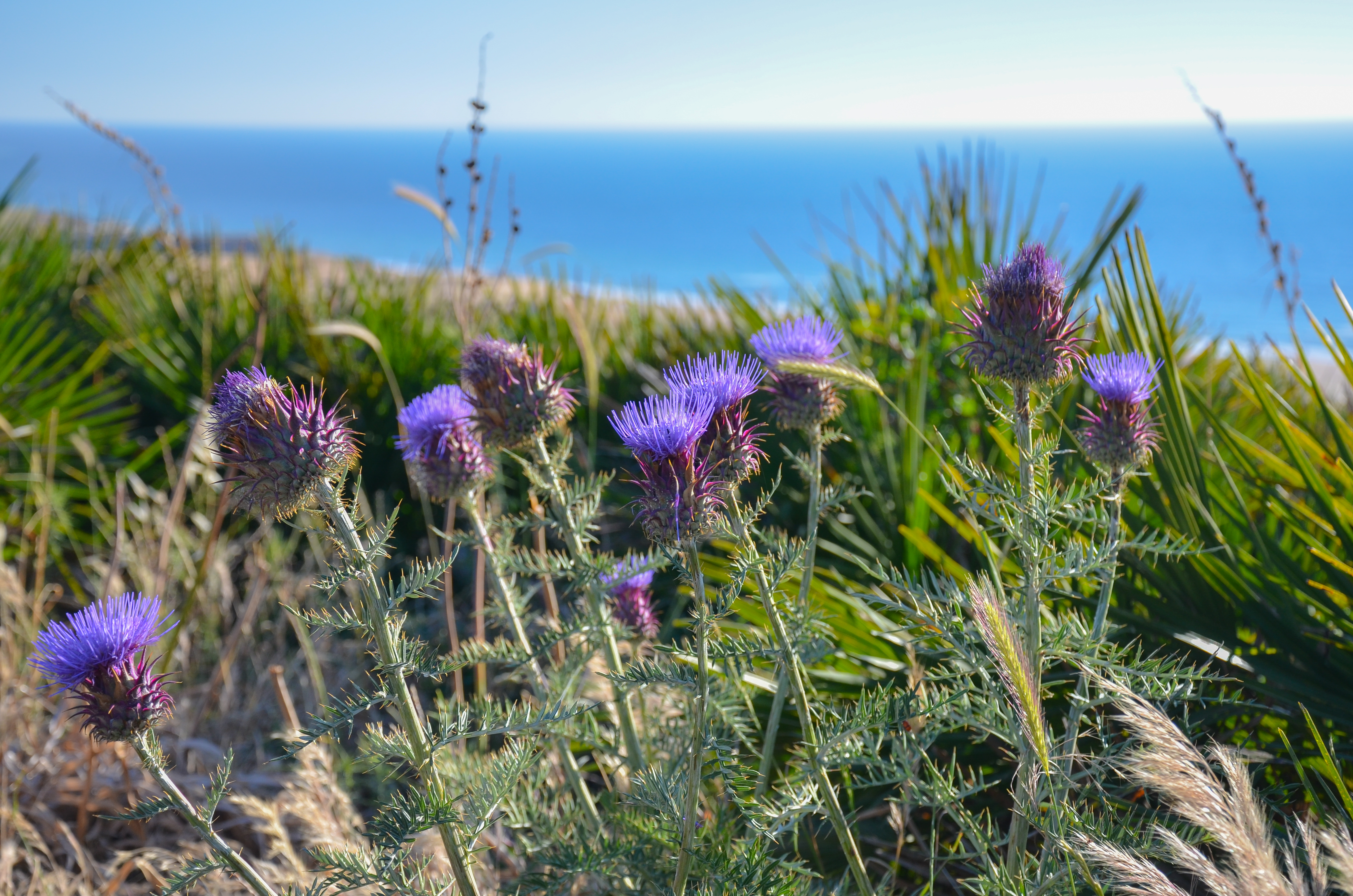 Цветы на побережье Атлантического океана в Марокко.